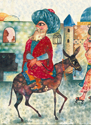 Nasreddin and his donkey.